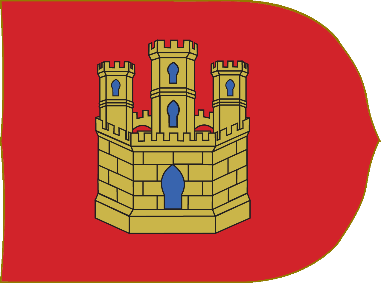 Estandarte del Reino de Castilla, creado a partir de Image:Escudo de Castilla.png y de Image:Estandarte de la Corona de Castilla.png